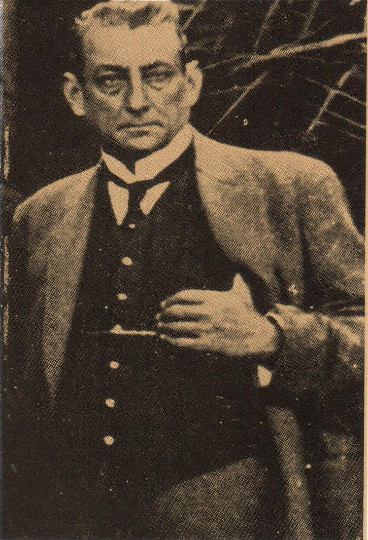 Capitán Adolfo Bassó Bertoliat